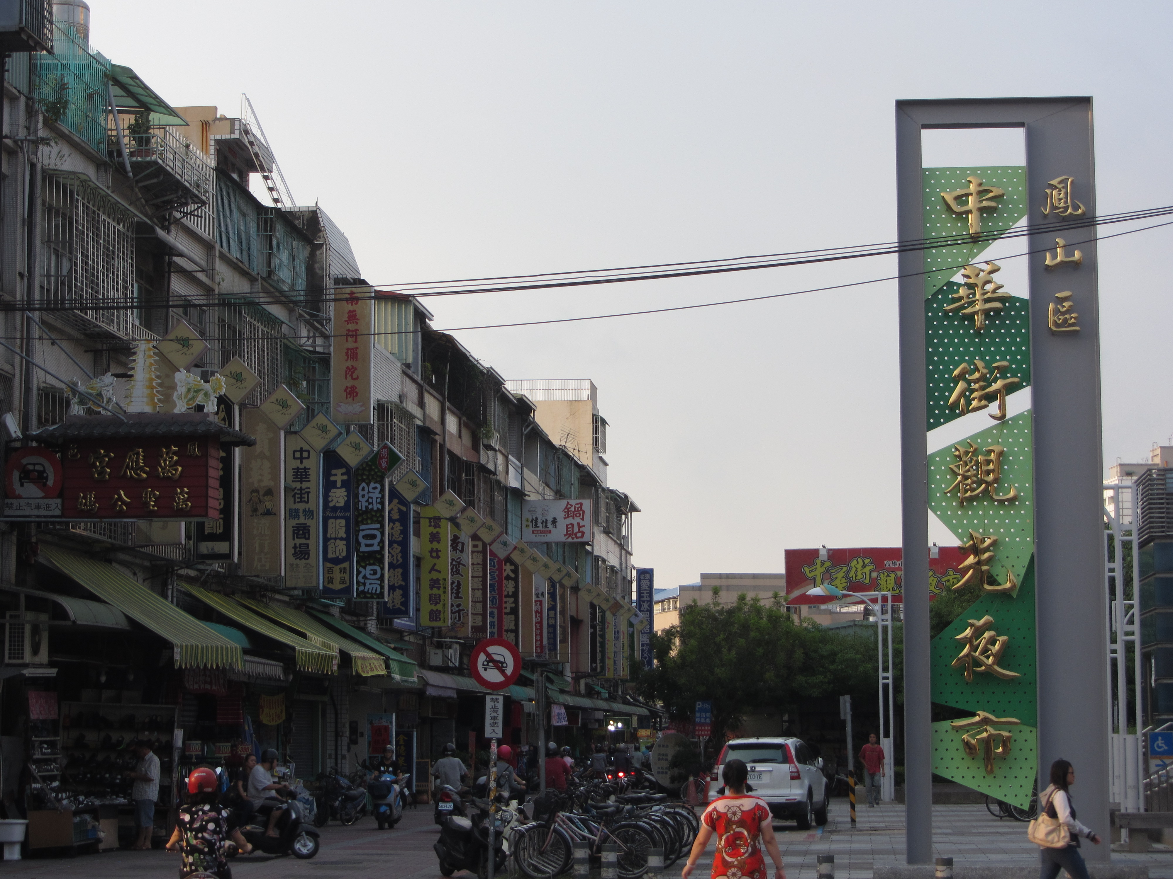 高雄市鳳山區中華街觀光夜市